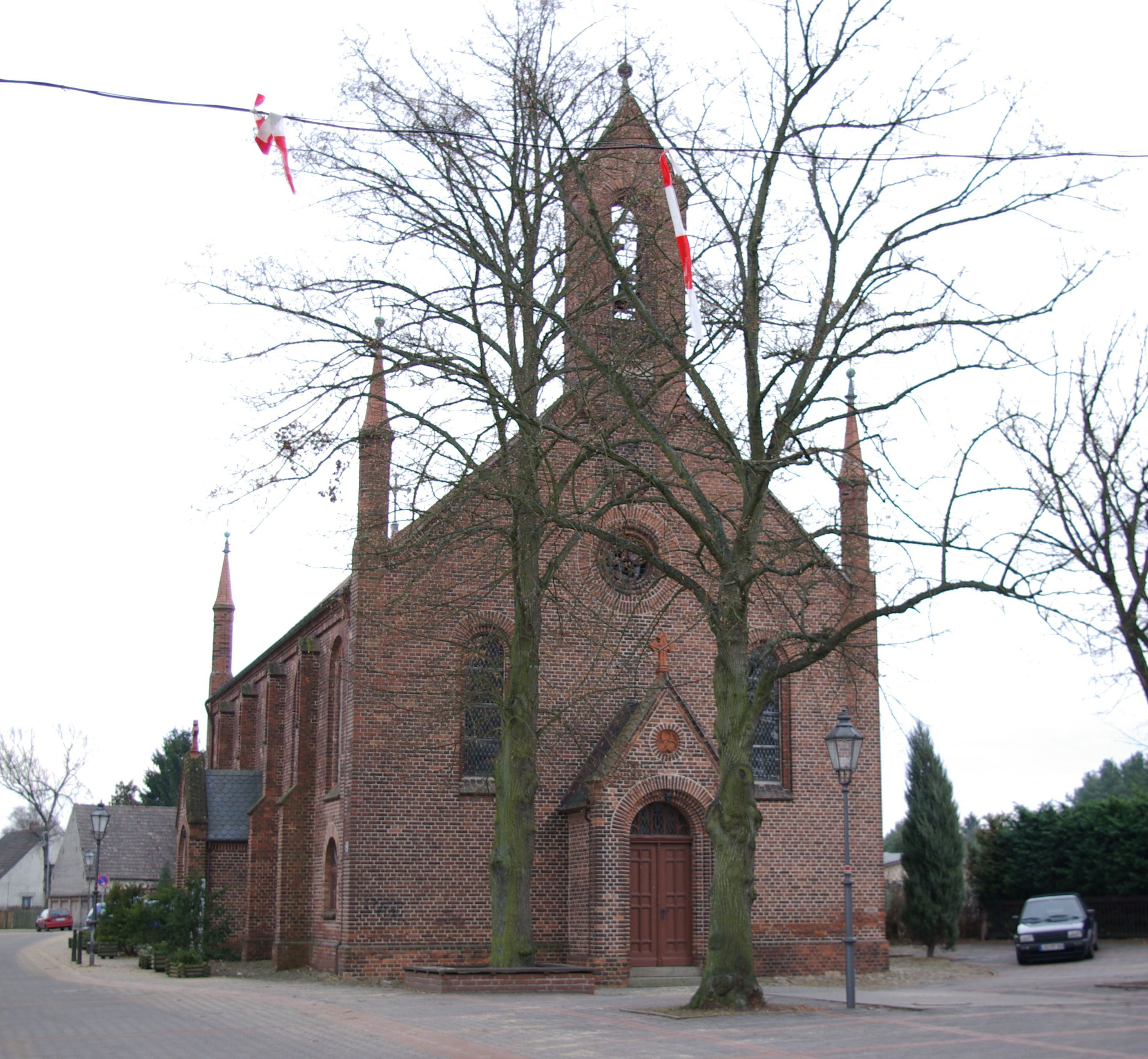 Brandenburg, Groß Lindow, die Kirche